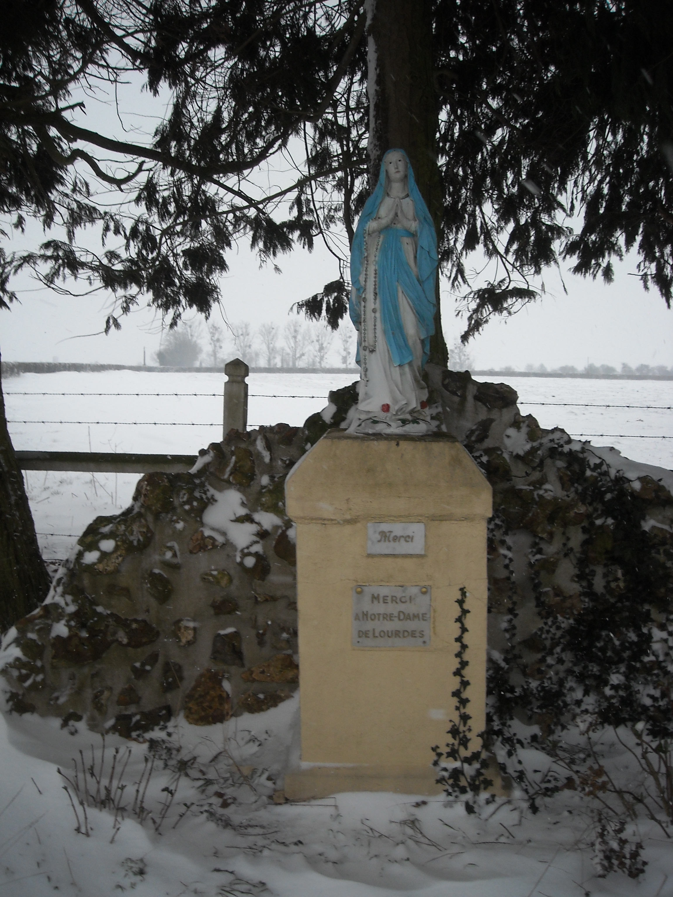 Statue de la vierge - Saint-Victor-de-Chrétienville (Eure), le 12 mars 2013